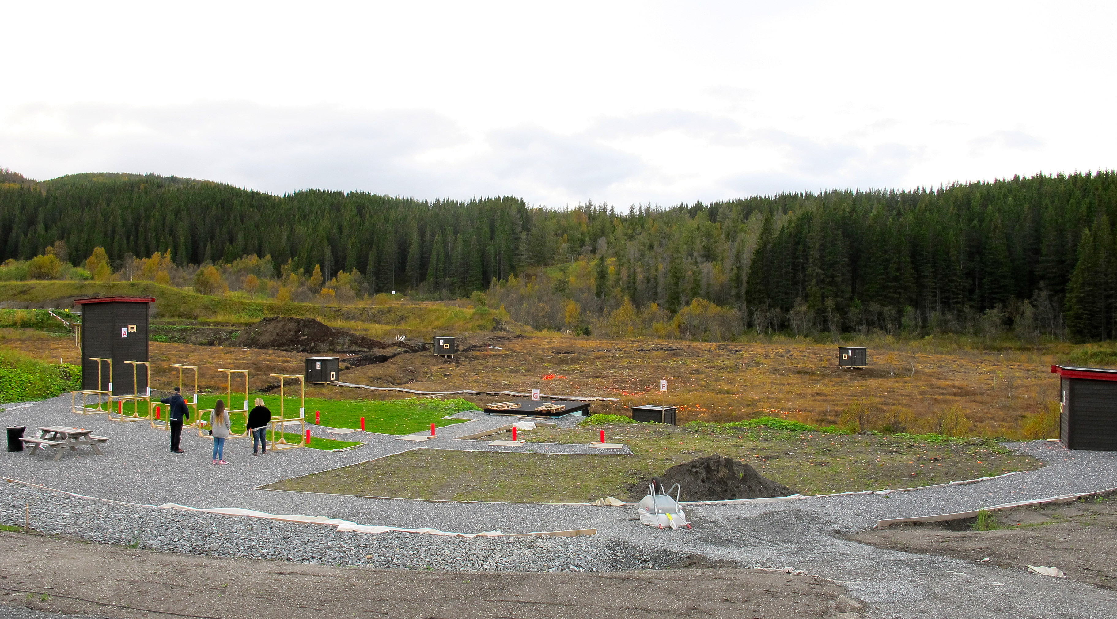 Bane med mulighet for trap-, sporting- og skeetskyting